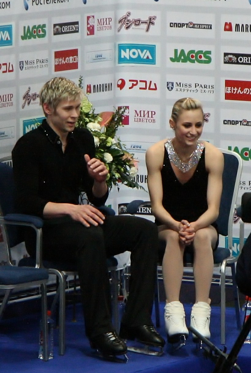 Эшли Кейн и Джошуа Рейган на Кубке Ростелекома 2011.